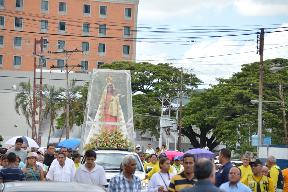 fotografia